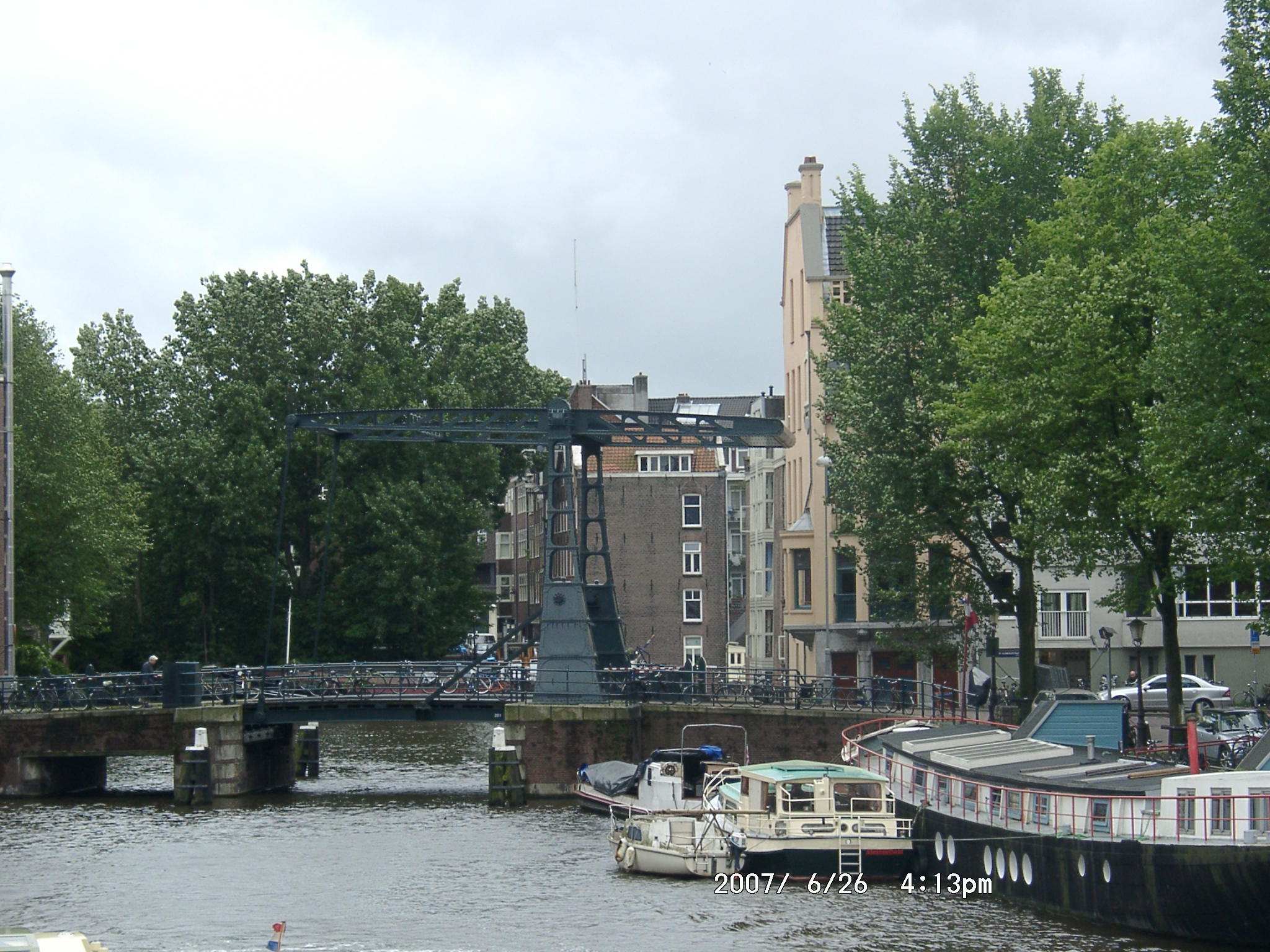 Rapenburgergracht, Rijksmonument Peperbrug (brug 281)